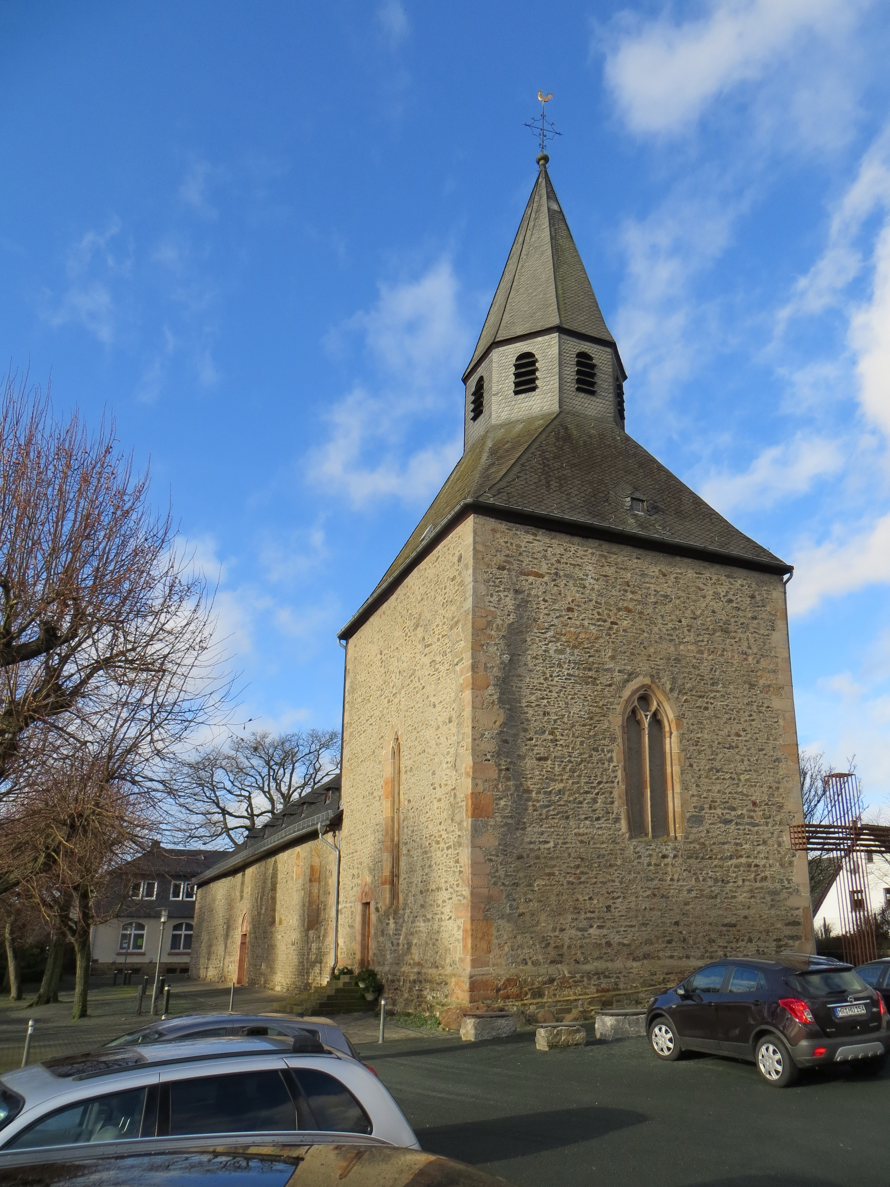 Martinskirche in Dautphe